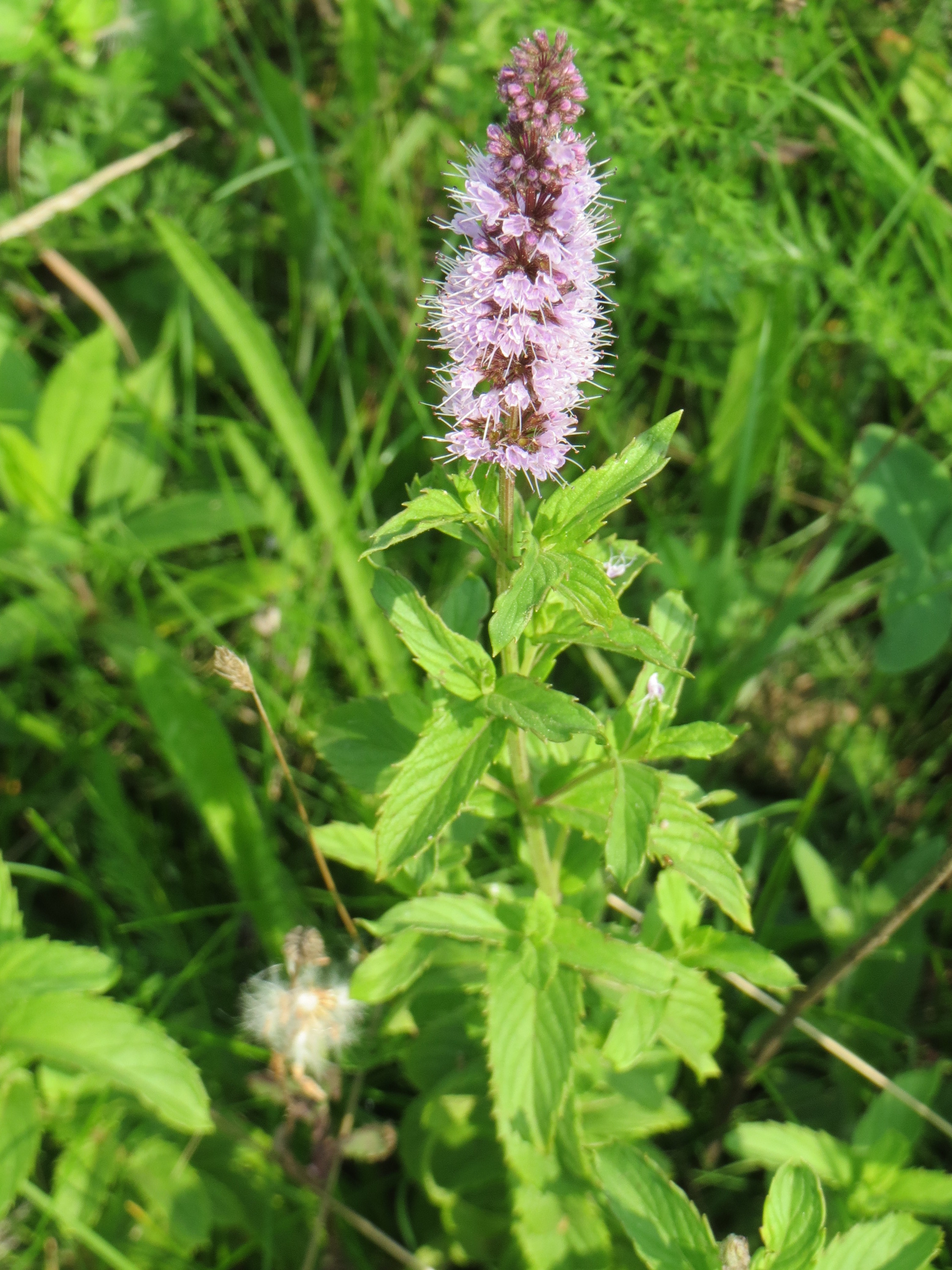 Grüne Minze (Mentha spicata) am Kriegbach bei Neulußheim (Gemarkung Altlußheim)